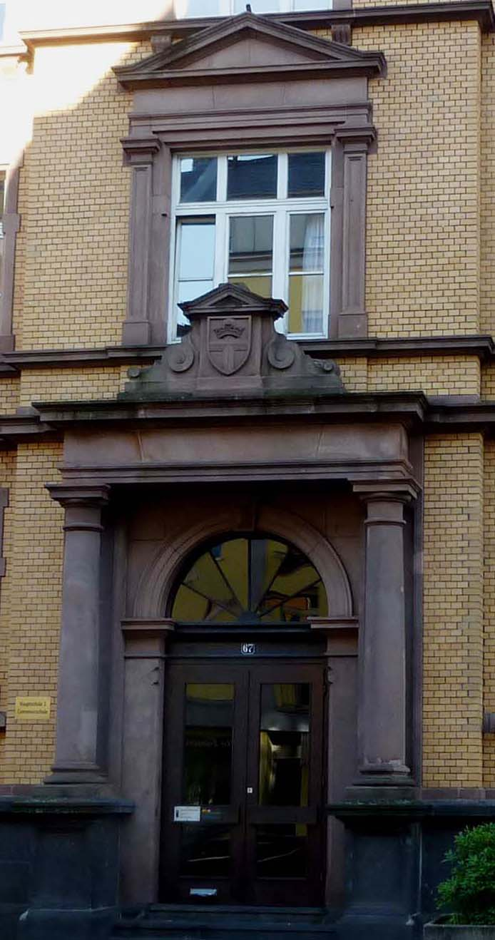 Portal der Cusanusschule Koblenz Hohenzollernstr. 67